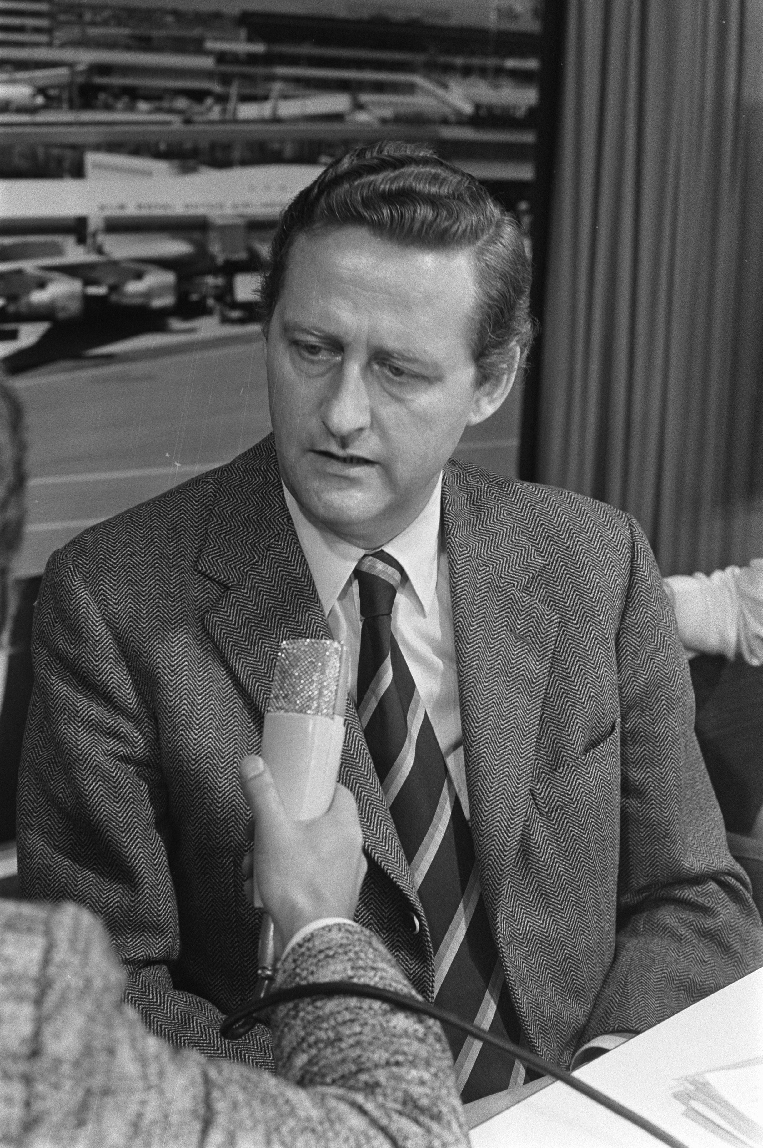 Collectie / Archief : Fotocollectie Anefo Reportage / Serie : [ onbekend ] Beschrijving : Minister van Ontwikkelingssamenwerking Kees Boertien Datum : 23 mei 1972 Locatie : Noord-Holland, Schiphol Trefwoorden : interviews, ministers, portretten Persoonsnaam : Boertien, C. Fotograaf : Verhoeff, Bert / Anefo Auteursrechthebbende : Nationaal Archief Materiaalsoort : Negatief (zwart/wit) Nummer archiefinventaris : bekijk toegang 2.24.01.05 Bestanddeelnummer : 925-6132